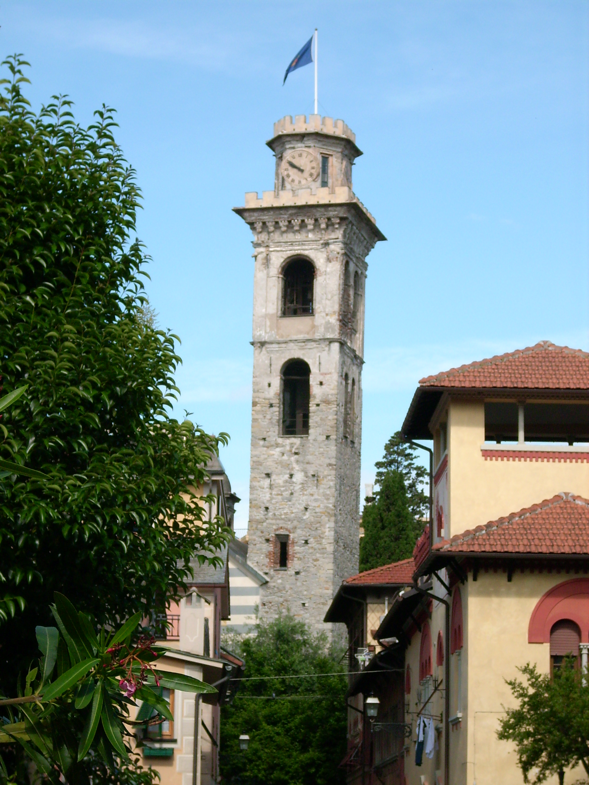 Torre Civica di Rapallo, Liguria, Italia